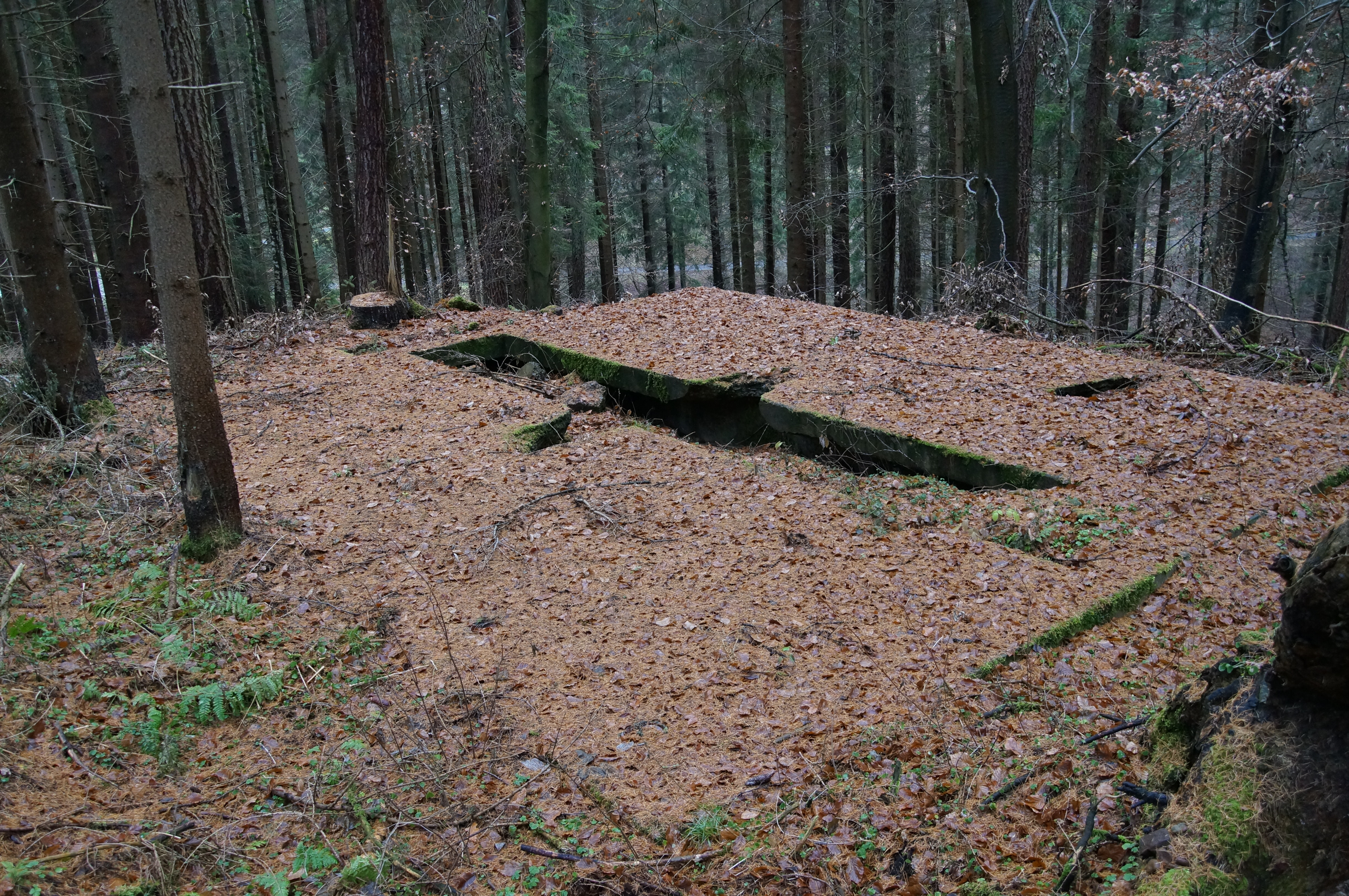 Fundament einer der drei einstigen Sanitärbaracken im Lager Pfaffenwald